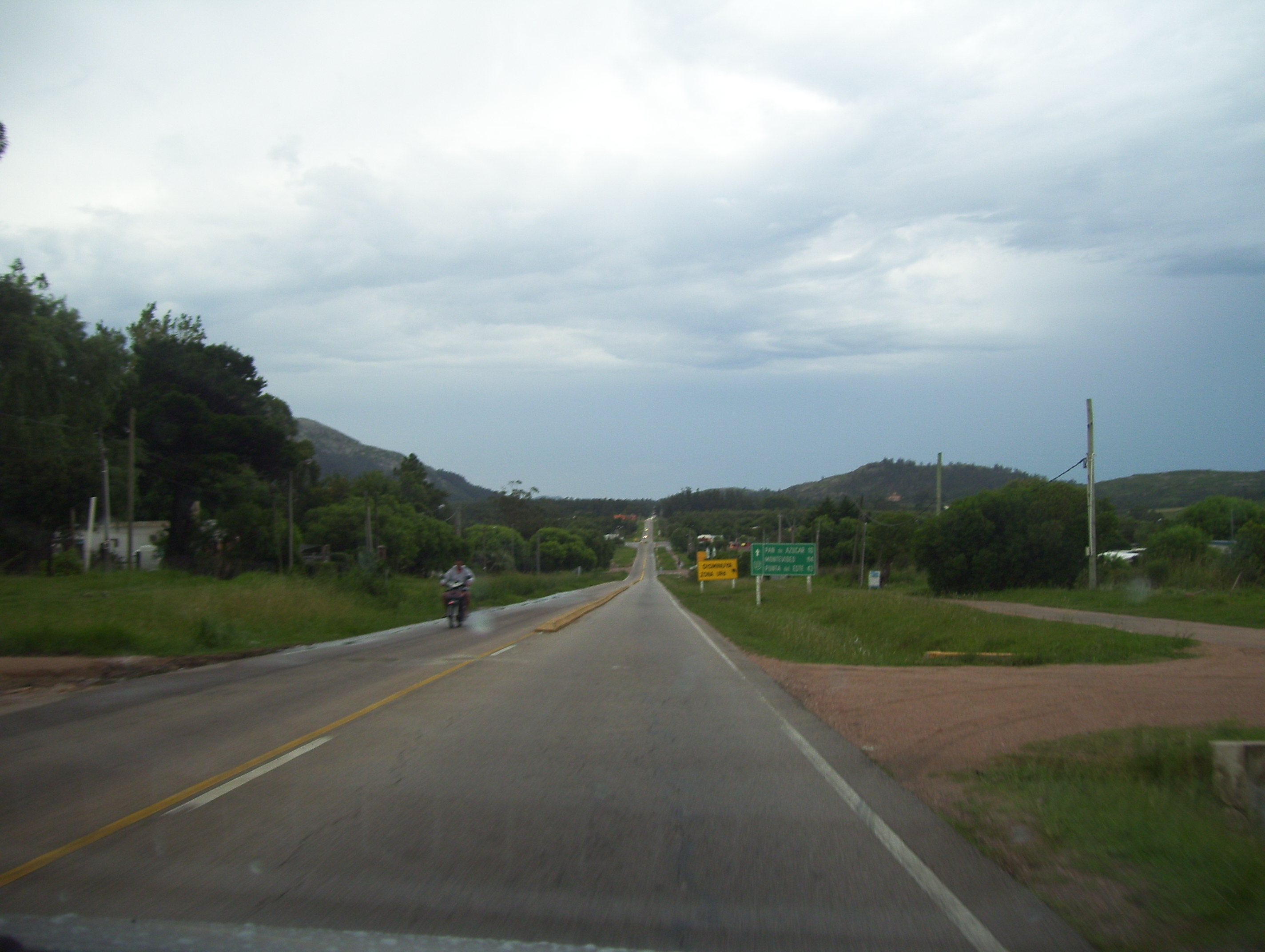 Ruta 37 dirección sur-norte (Piriápolis-Pan de Azúcar), Uruguay